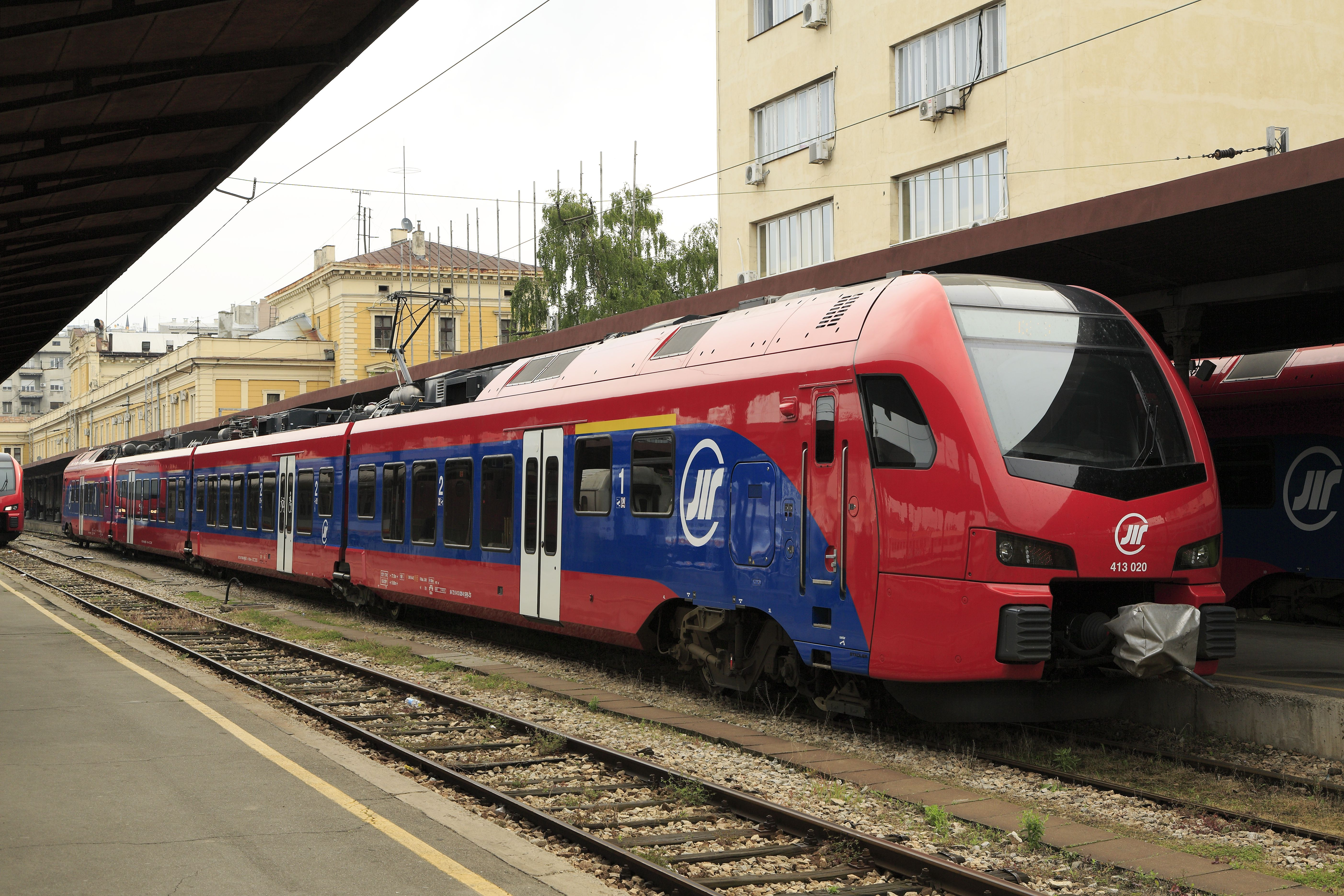 Einer der neuen Stadler-Triebzüge, hier bei offensichtlichen Werbefilmaufnahmen. Die serbischen »FLIRT 3« sind bisher alle aufallend sauber und nicht besprüht. Hoffen wir, dass das so bleibt.